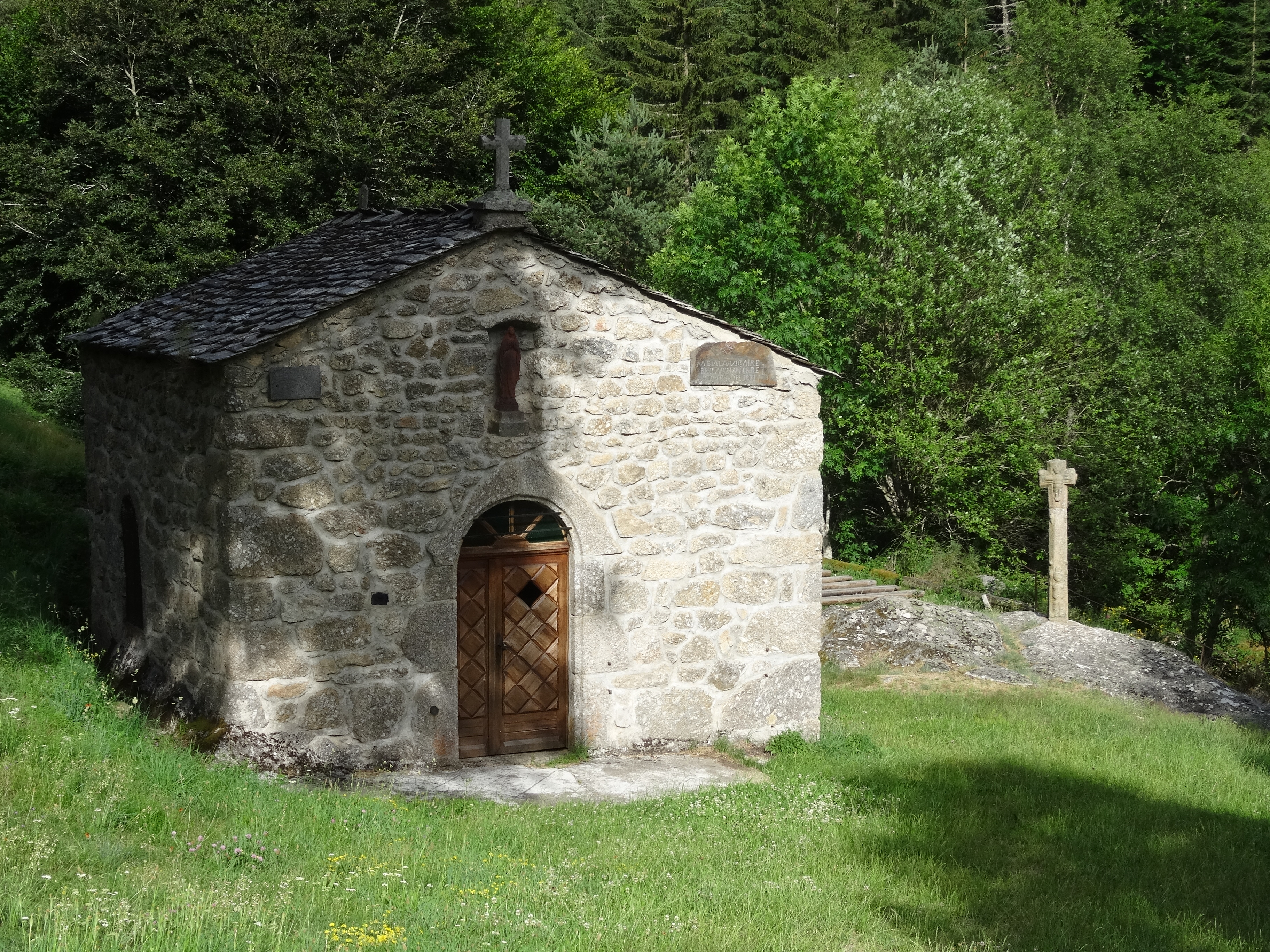 Saint Meen chapel-Grandrieu-Margeride -Lozère